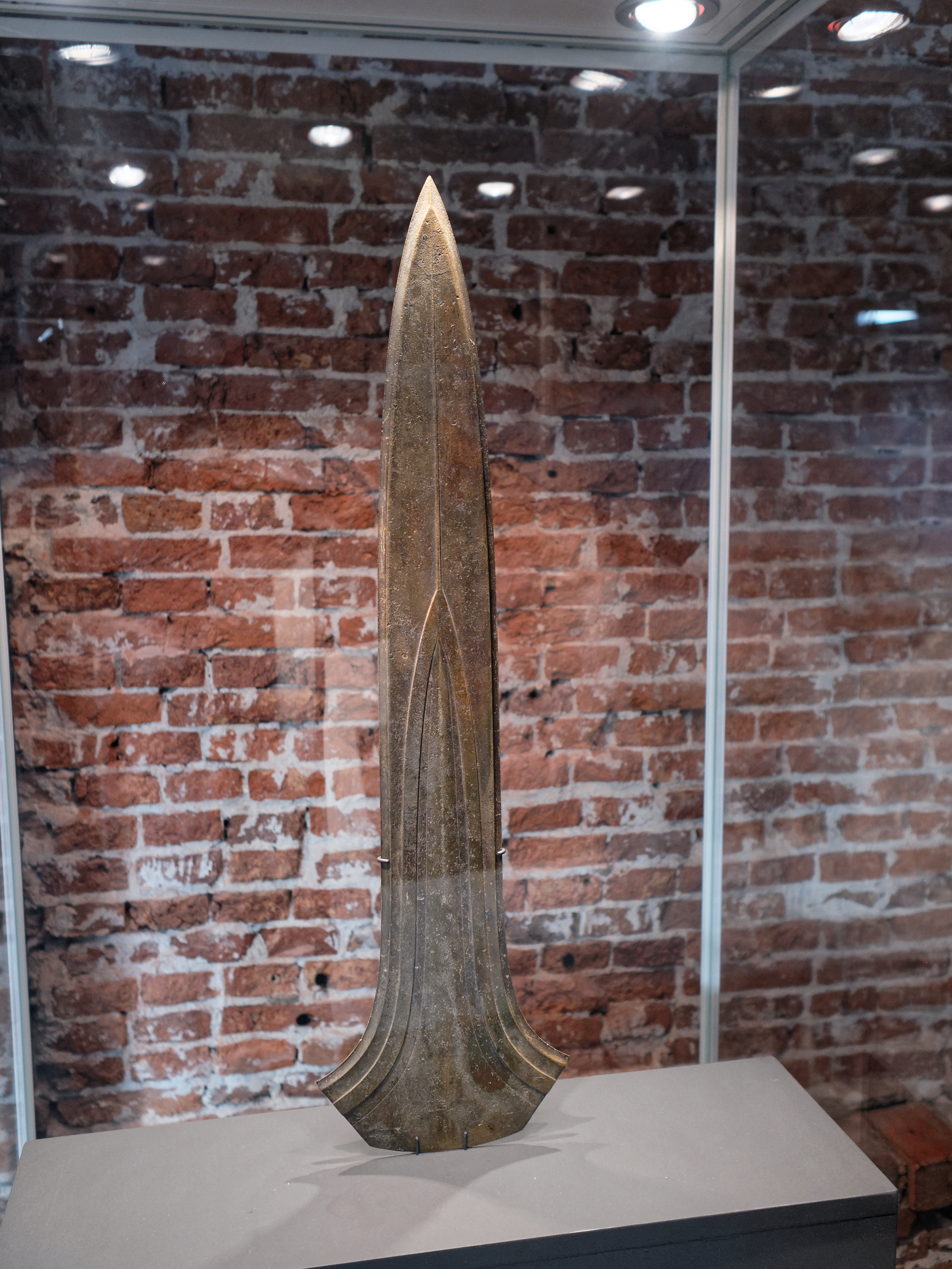 Zwaard van Ommerschans. Zwaard uit de Bronstijd (Plougrescant-Ommerschans) Rijksmuseum van Oudheden